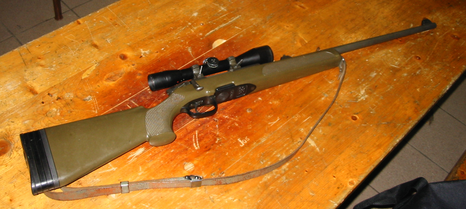 Das Steyr SSG 69, ausführung für das österreichische Bundesheer